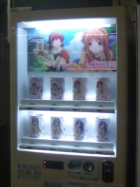 「CLANNADパン缶」の自動販売機。2007年10月1日から10月31日までJR秋葉原駅6番ホーム上の自動販売機で販売された。Clannad influence